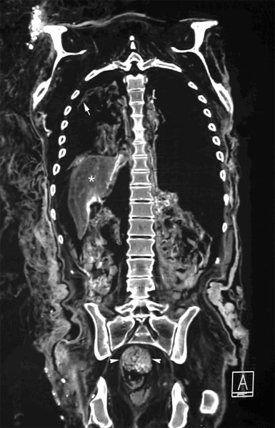 Esami sulla mummia di Cangrande della Scala